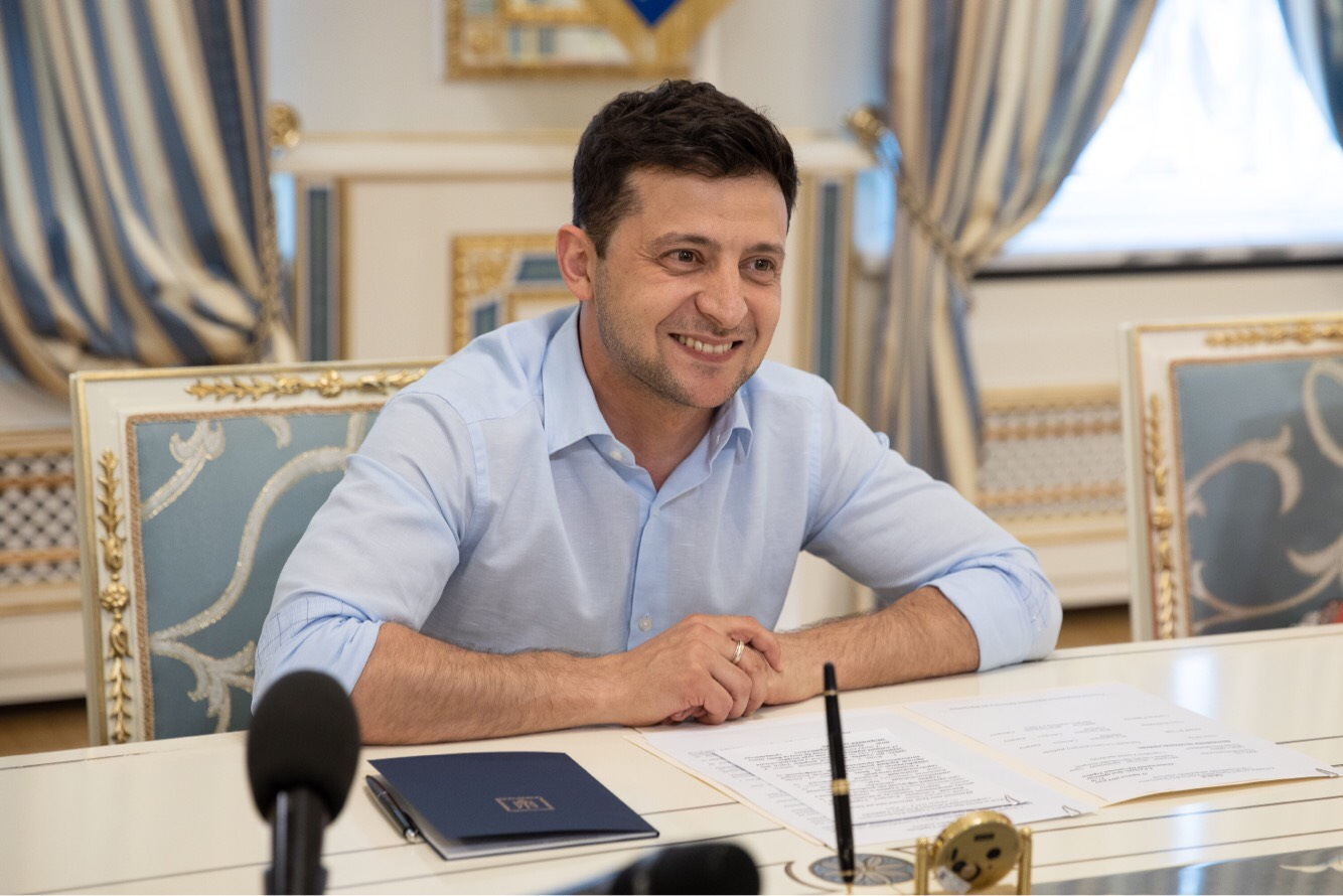 Зеленський зустрівся з представниками Світового конгресу українців